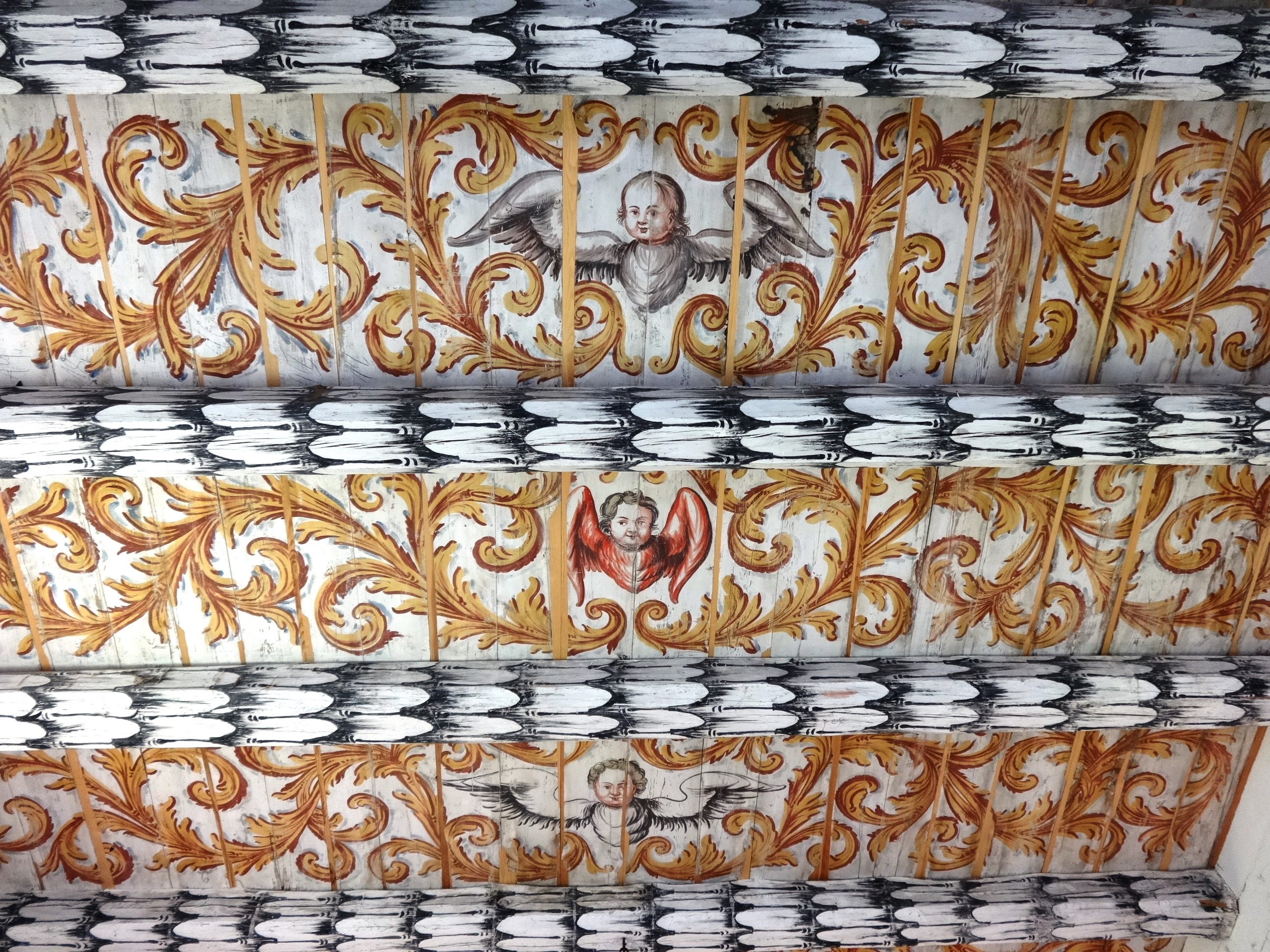 St. Nikolai zu Bauer, eine Feldsteinkirche aus dem 13. Jahrhundert in Wehrland, ein Ortsteil der Gemeinde Zemitz, Landkreis Vorpommern-Greifswald